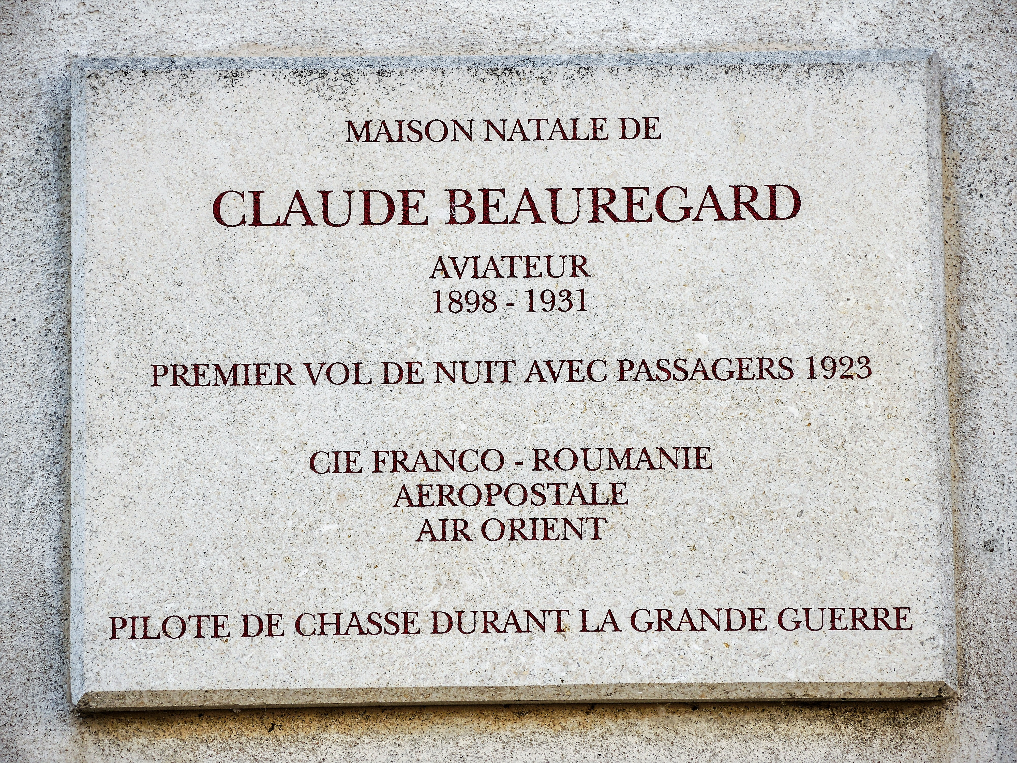 Plaque-mémorial de Claude Beauregard. Xirocourt. Meurthe-et-Moselle